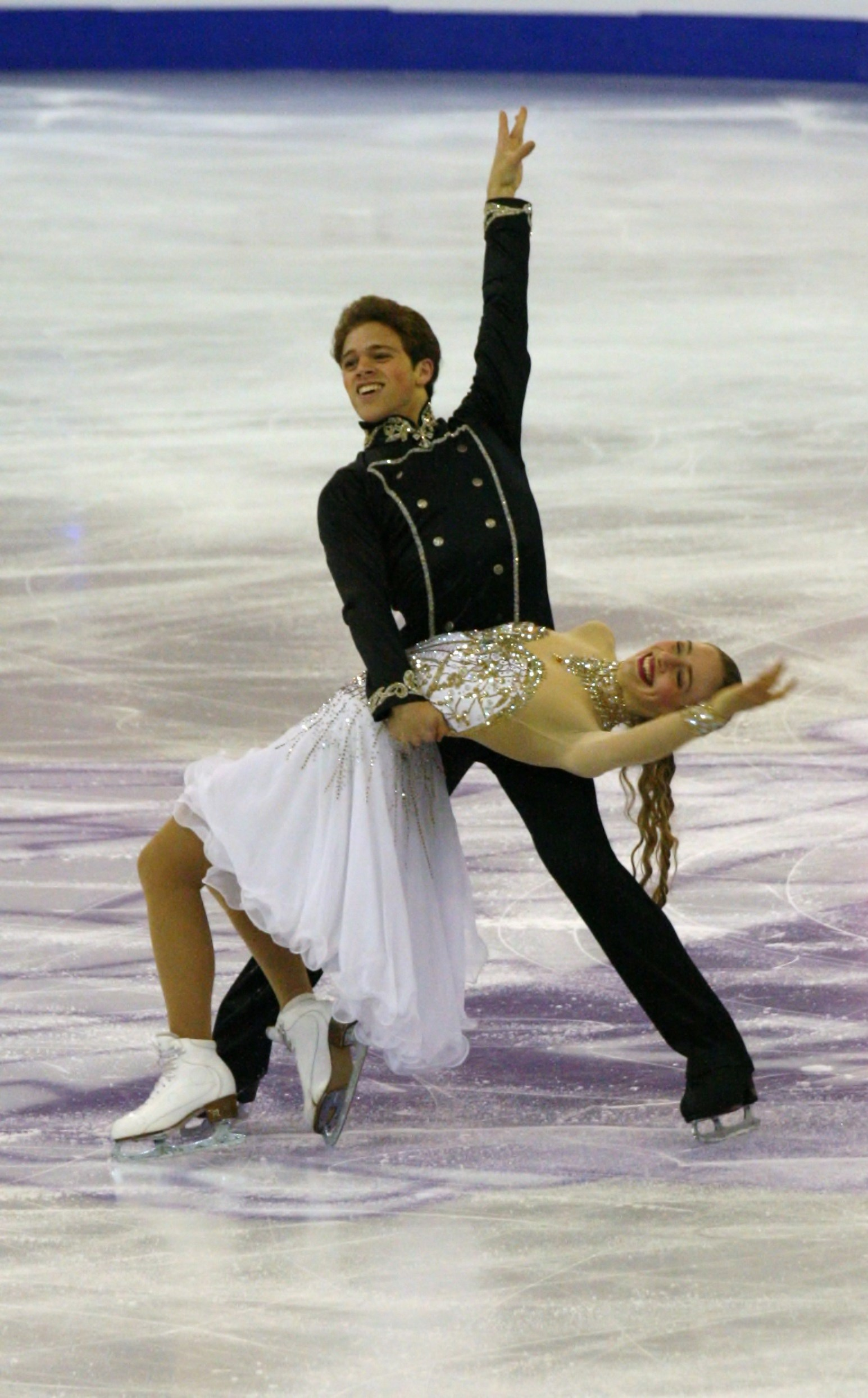 Рэйчер Парсонс и Майкл Парсонс (США) на финале Гран-при по фигурному катанию среди юниоров 2015-2016.